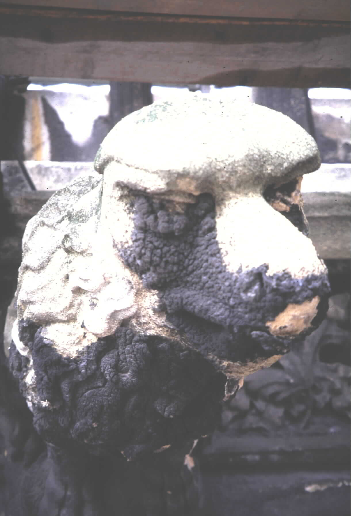 Bild zeigt die Verwitterungen an einem Wasserspeier aus Kalksandstein. Der Wasserspeier stammt vom Wiener Stephansdom